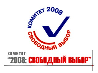 Логотип группы Комитет 2008: Свободный выбор